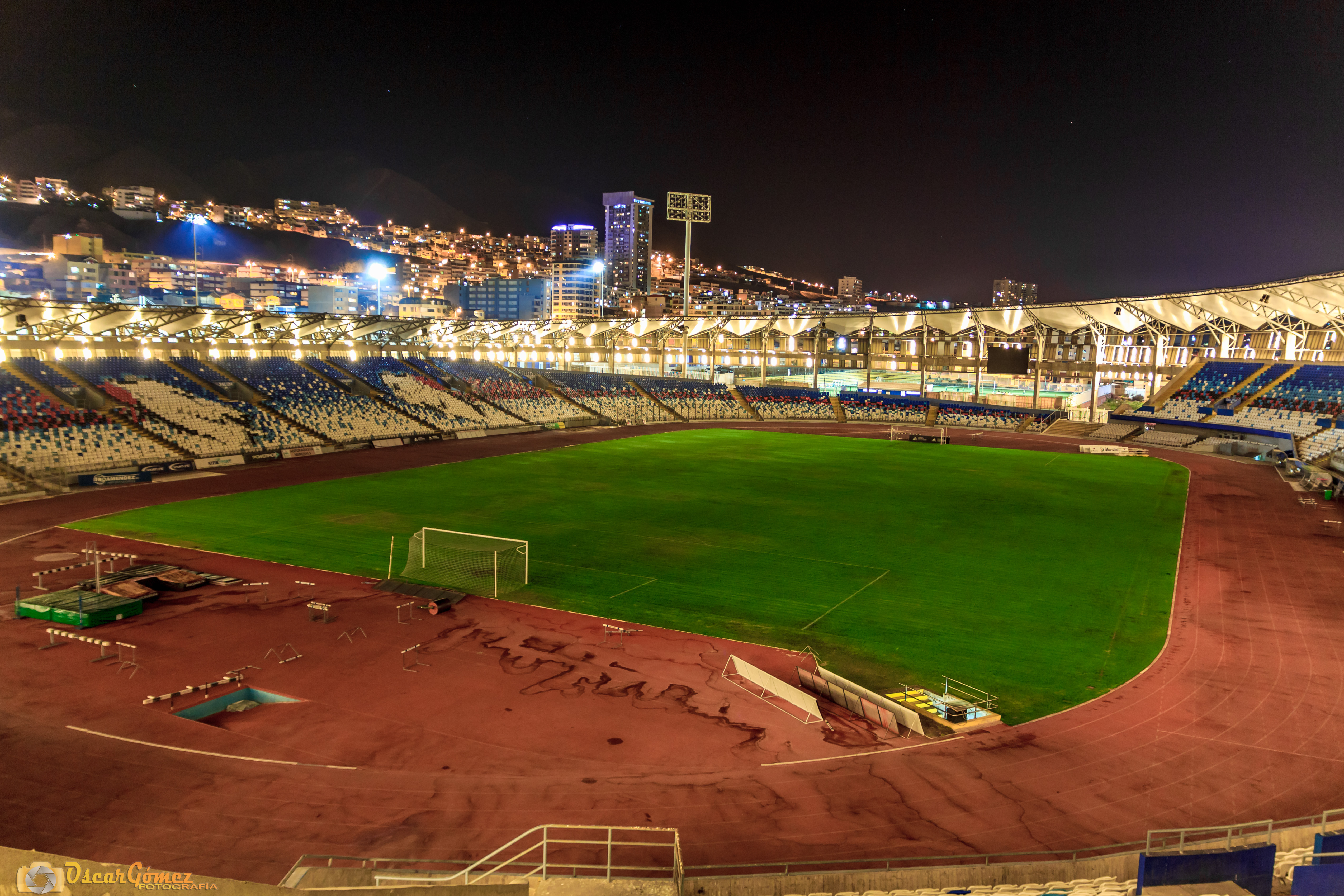 Vista nocturna del estadio regional Calvo y Bascuñán de Antofagasta.